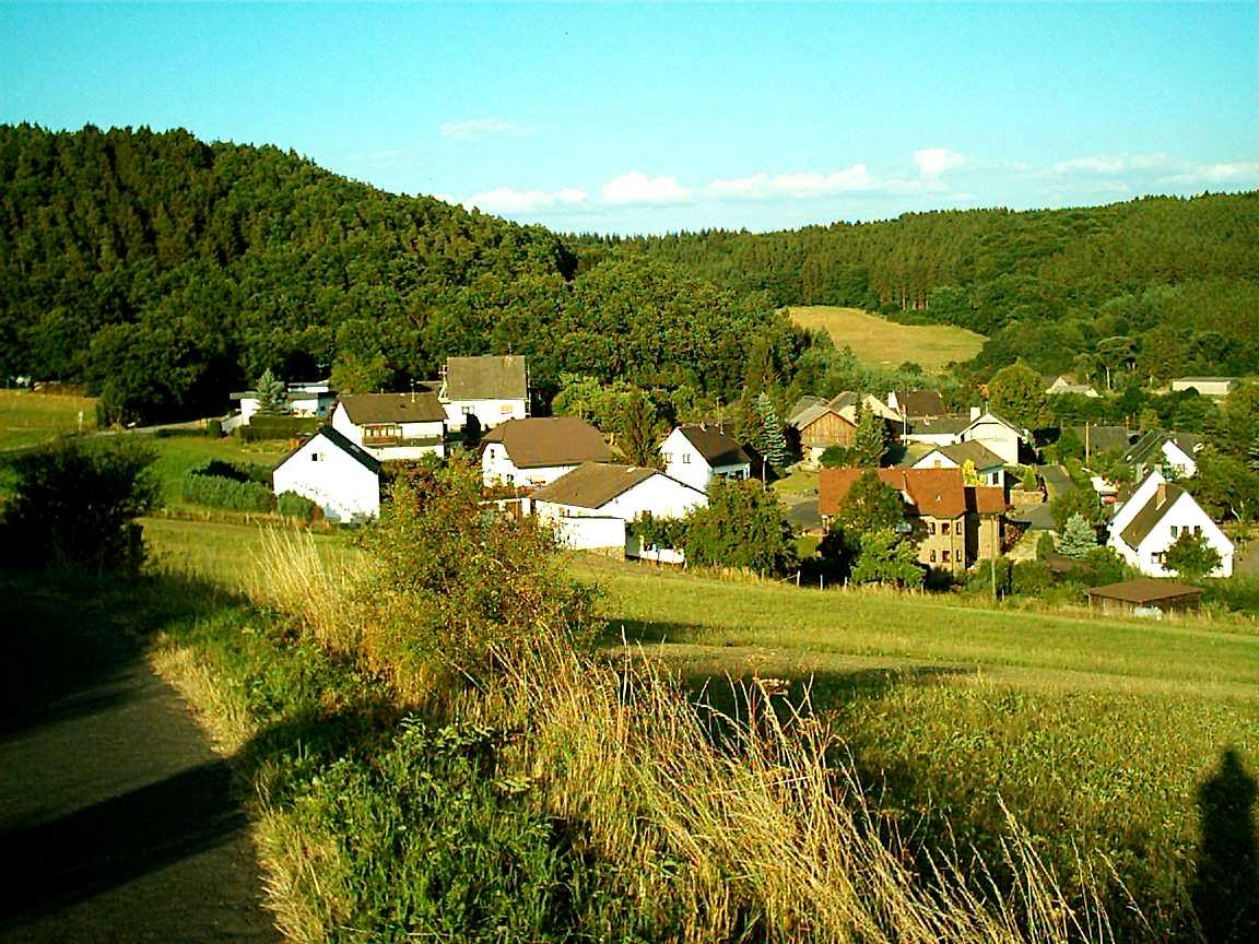 Das Örtchen Wirft von Nordwesten gesehen